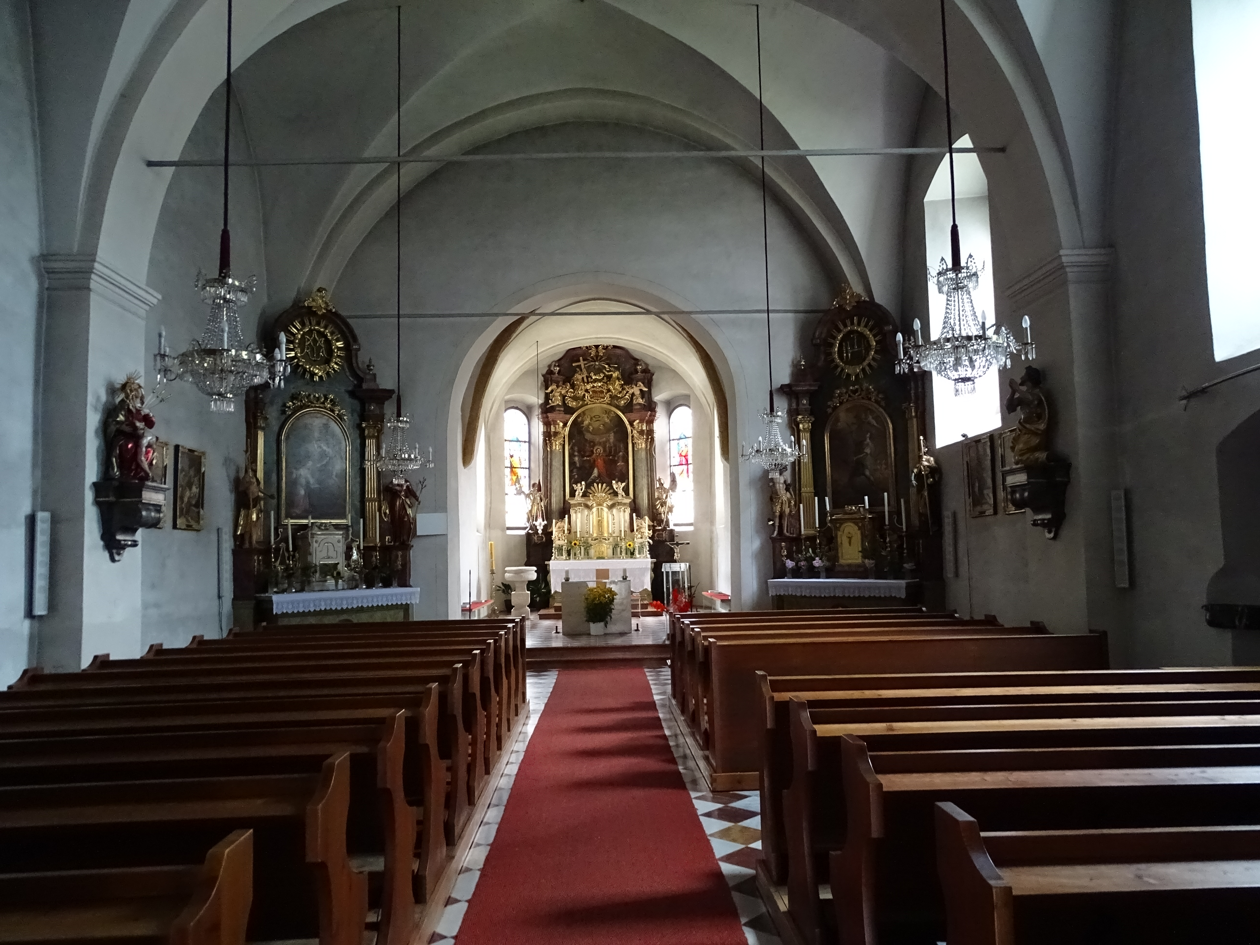 Blick auf den Hochaltar der Pfarrkirche Gratkorn